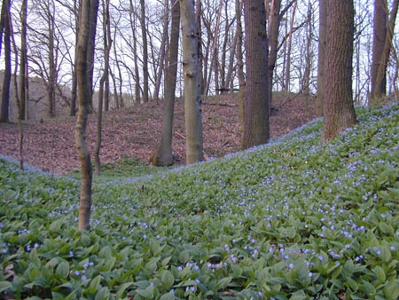 Räuberberg bei Görsdorf